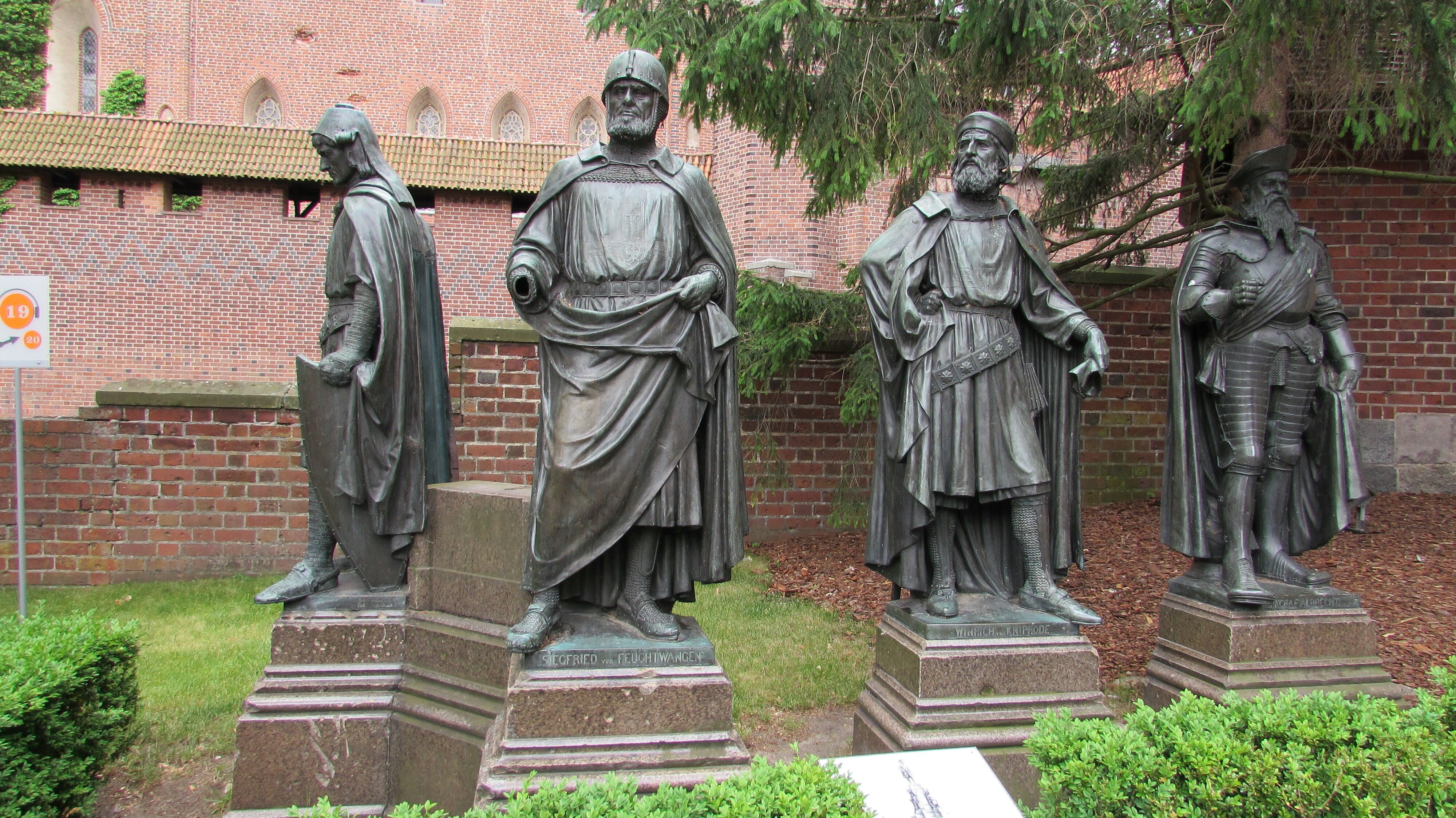 MalborkHochmeisterDeutschOrden